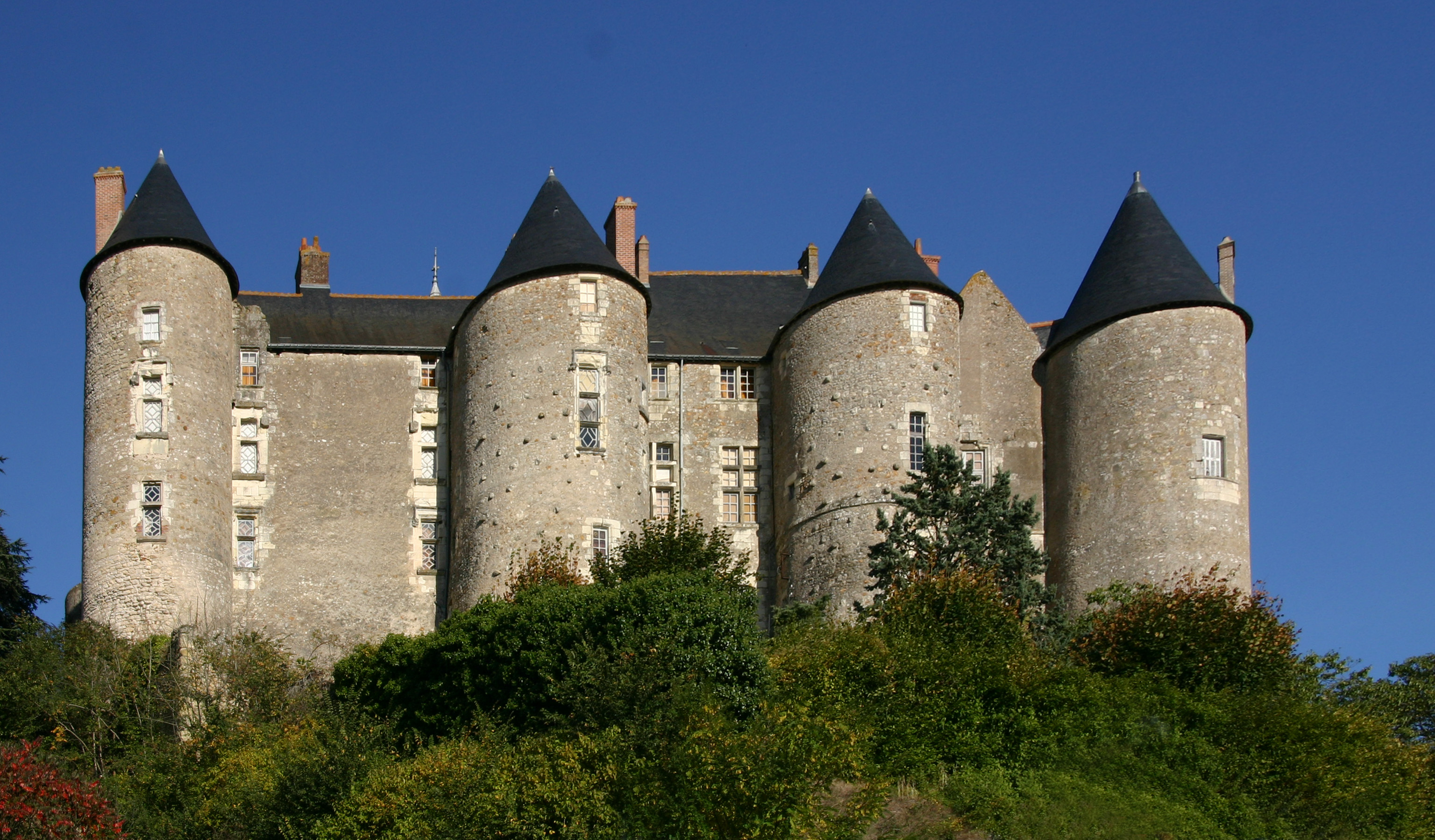 Schloss Luynes